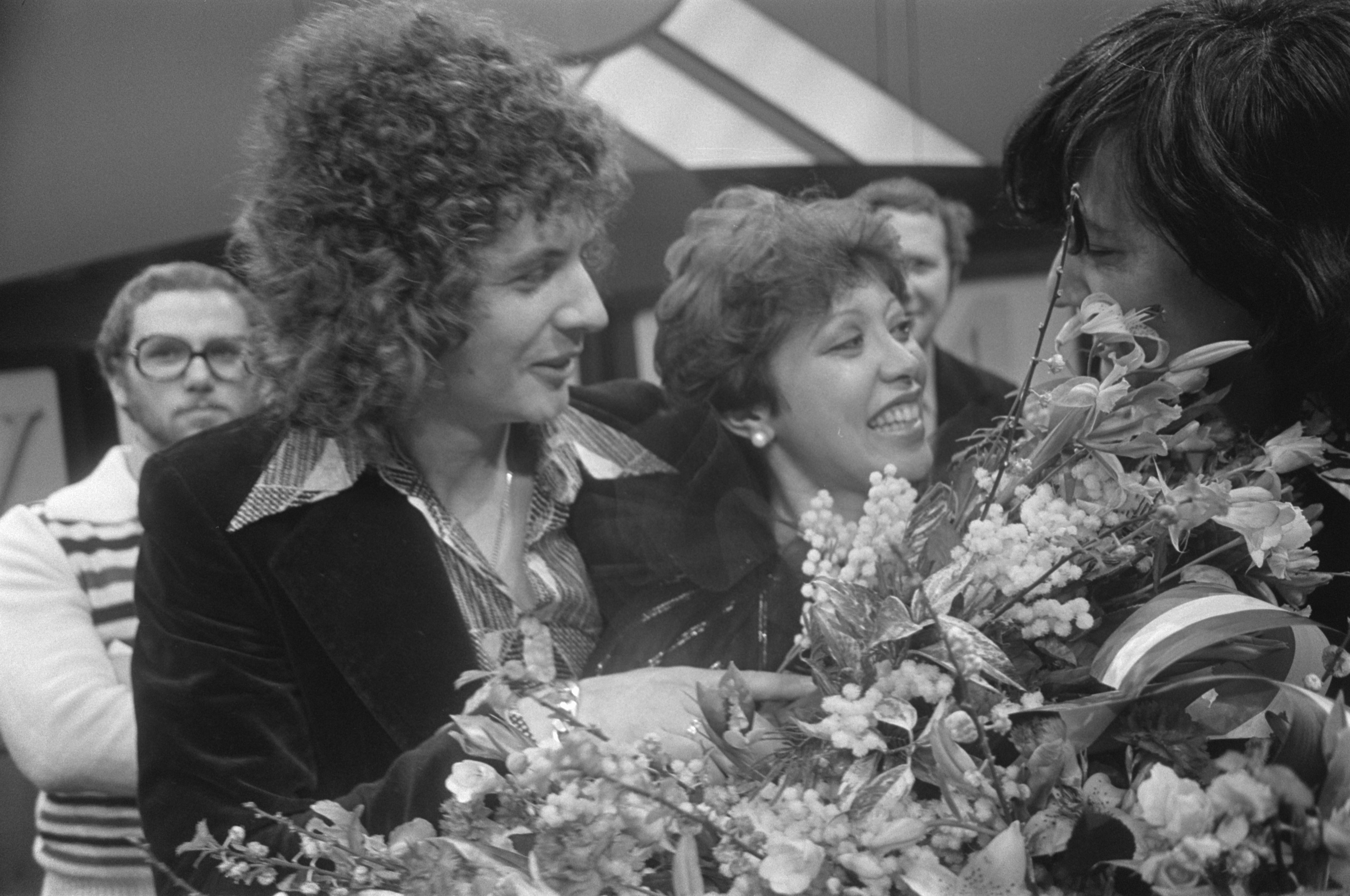 Collectie / Archief : Fotocollectie Anefo Reportage / Serie : [ onbekend ] Beschrijving : Nationaal Songfestival in Congrescentrum Den Haag ; winnares Sandra met tekstschrijver Hans van Hemert in de bloemen Datum : 18 februari 1976 Locatie : Den Haag, Zuid-Holland Trefwoorden : BLOEMEN, CONGRESCENTRA, songfestivals, winnaars Instellingsnaam : Nationaal Songfestival Fotograaf : Peters, Hans / Anefo Auteursrechthebbende : Nationaal Archief Materiaalsoort : Negatief (zwart/wit) Nummer archiefinventaris : bekijk toegang 2.24.01.05 Bestanddeelnummer : 928-4195 Reacties Geplaatst door Maaike op 19 juli 2012 - 22:43. met het liedje 'The party is over'; tekst en muziek van Hans van Hemert. Persoonsnamen: Sandra Reemer, Hans van Hemert